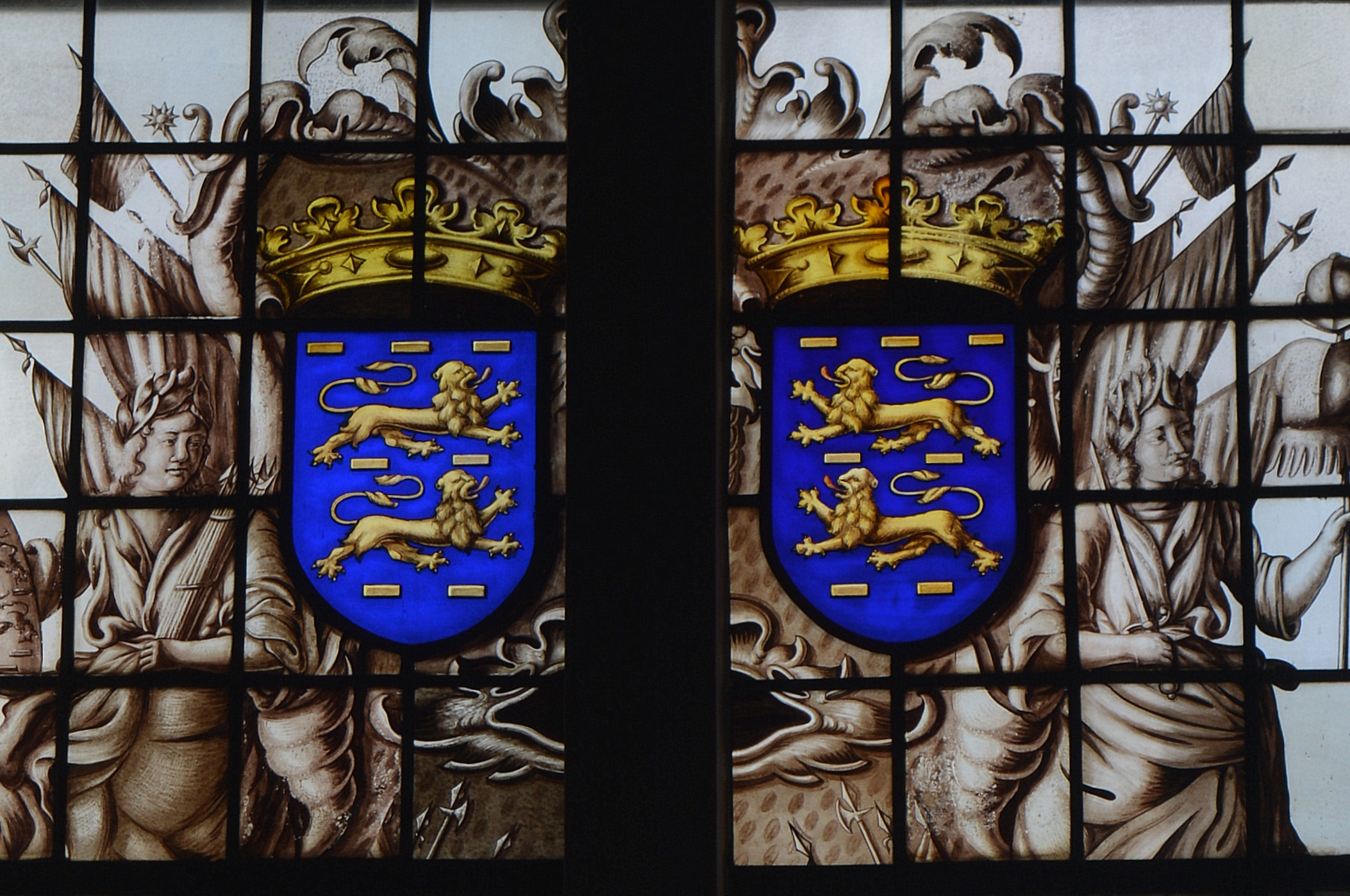 Surhuizum, prot. dorpskerk, raam Ypestaak, detail